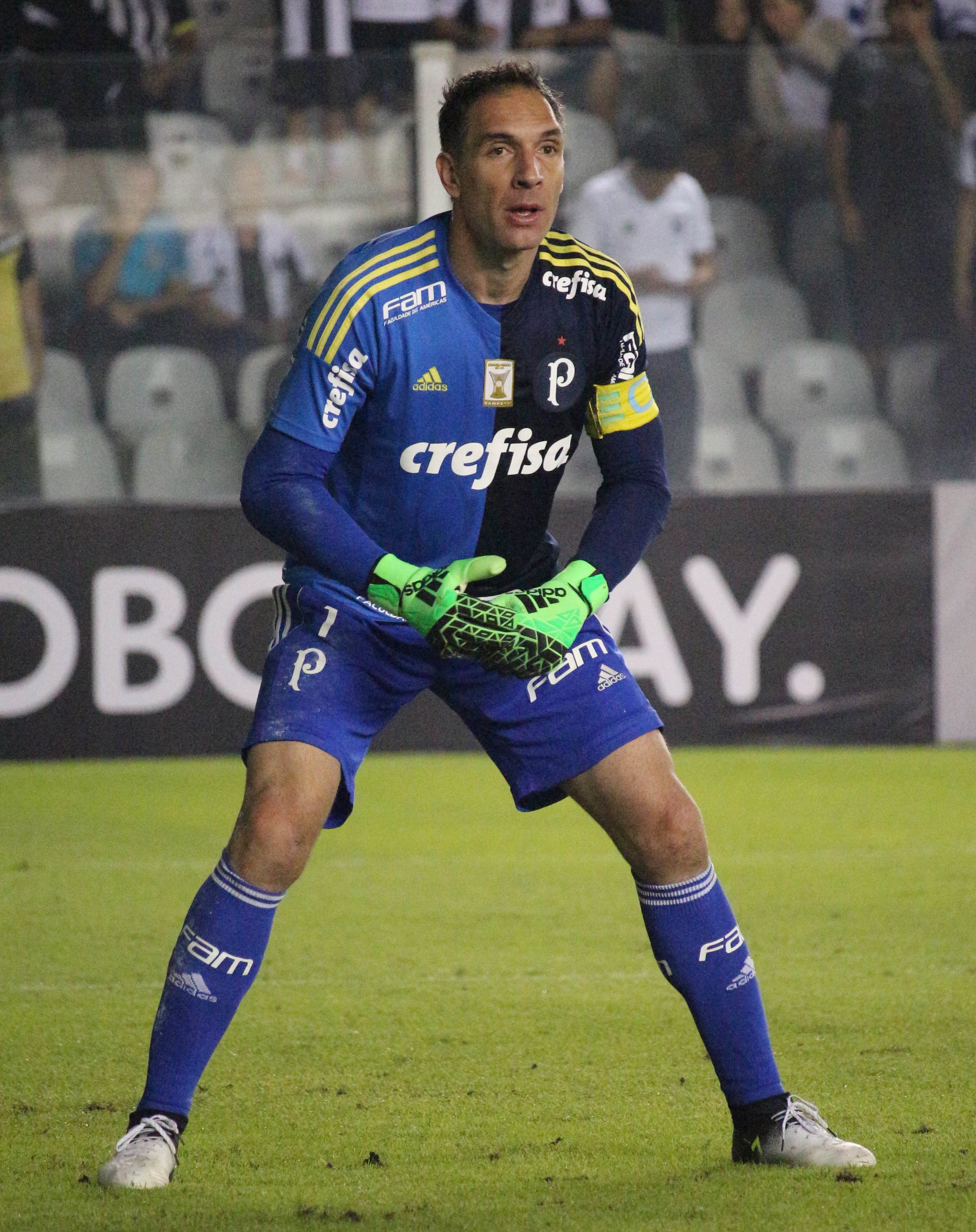 Foto: Douglas Teixeira/Futebol Santista